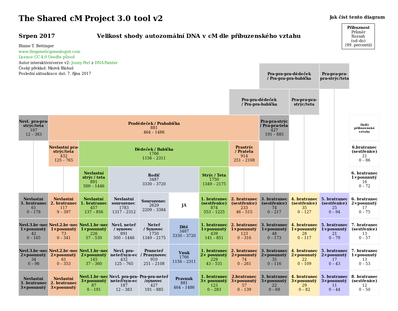 Diagram znázorňující velikost shody autozomální DNA v cM dle příbuzenského vztahu